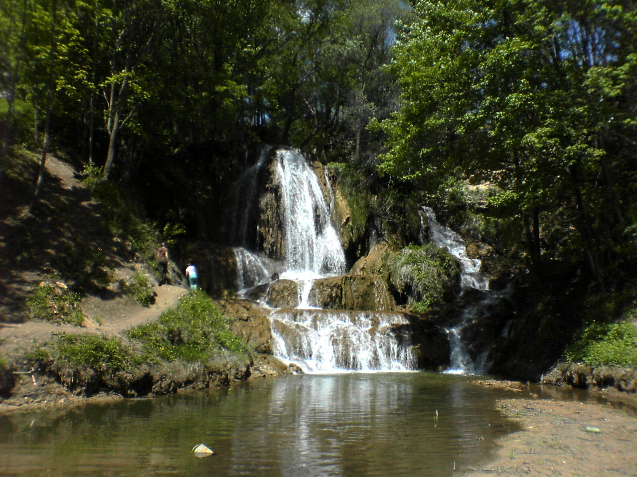 Waterfall in Lúčky